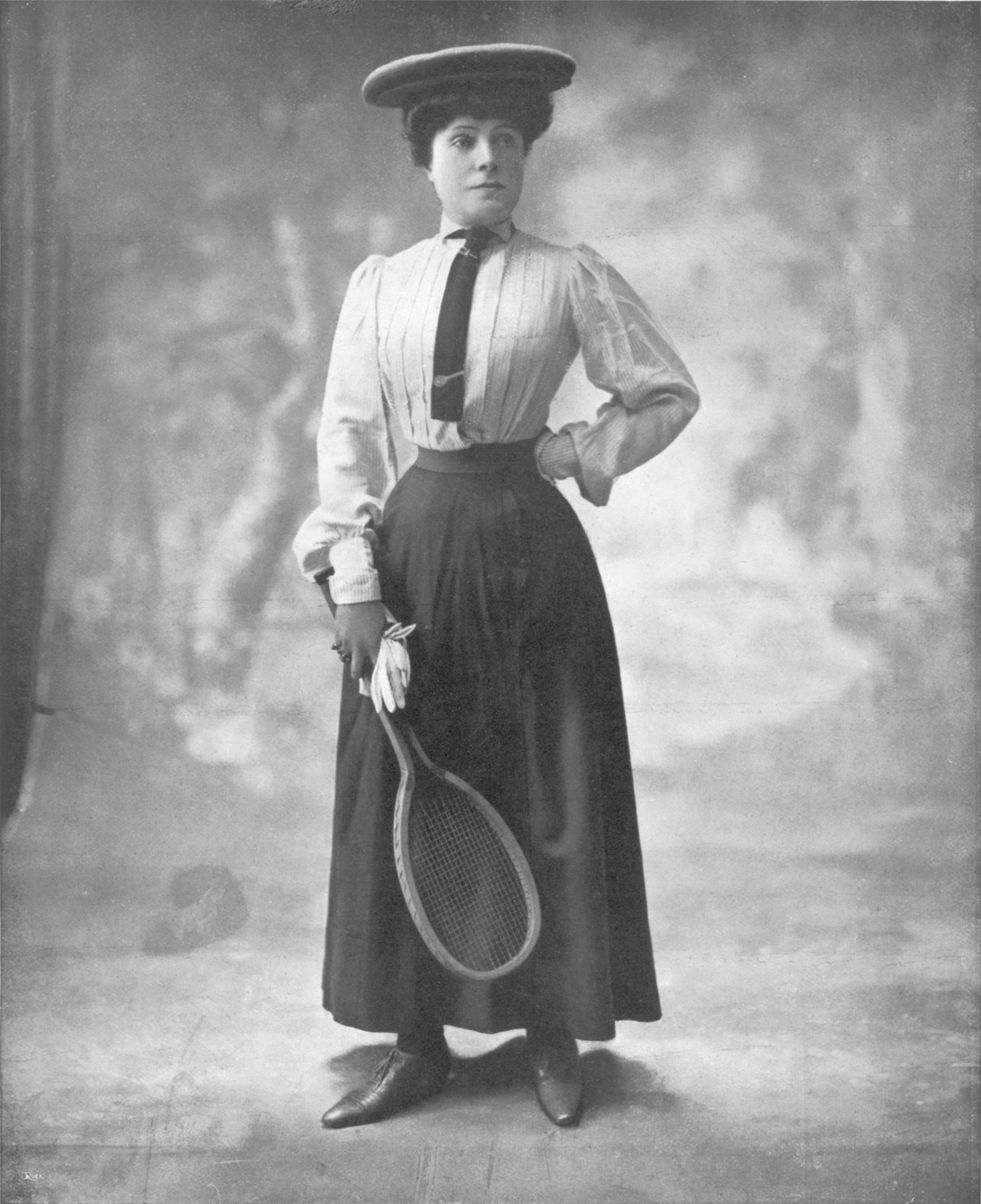 S. A. R. L'INFANTE EULALIE EN TENUE DE TENNISL'Infante Eulalie, qui pratique tous les sports avec une égale maîtrise, est une de nos meilleures raquettes de tennis, D'ailleurs, ce sport est entré dans les mœurs des familles royales : l'empereur Guillaume II et l'impératrice Victoria en sont des fervents, ainsi que la reine d'Angleterre et la jeune reine d'Espagne. S. A. R. l'Infante Eulalie, sœur du Roi Alphonse XII, a bien voulu venir spécialement poser pour nos lectrices dans les ateliers de la Photographie d'art Femina.